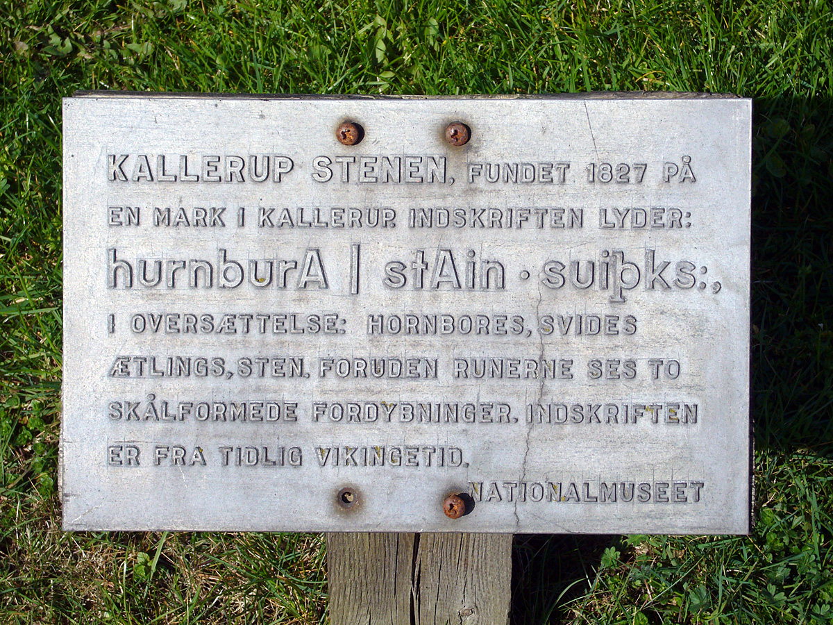 Kallerupstenen, Hedehusene, Denmark. Sign with explanation (in Danish).